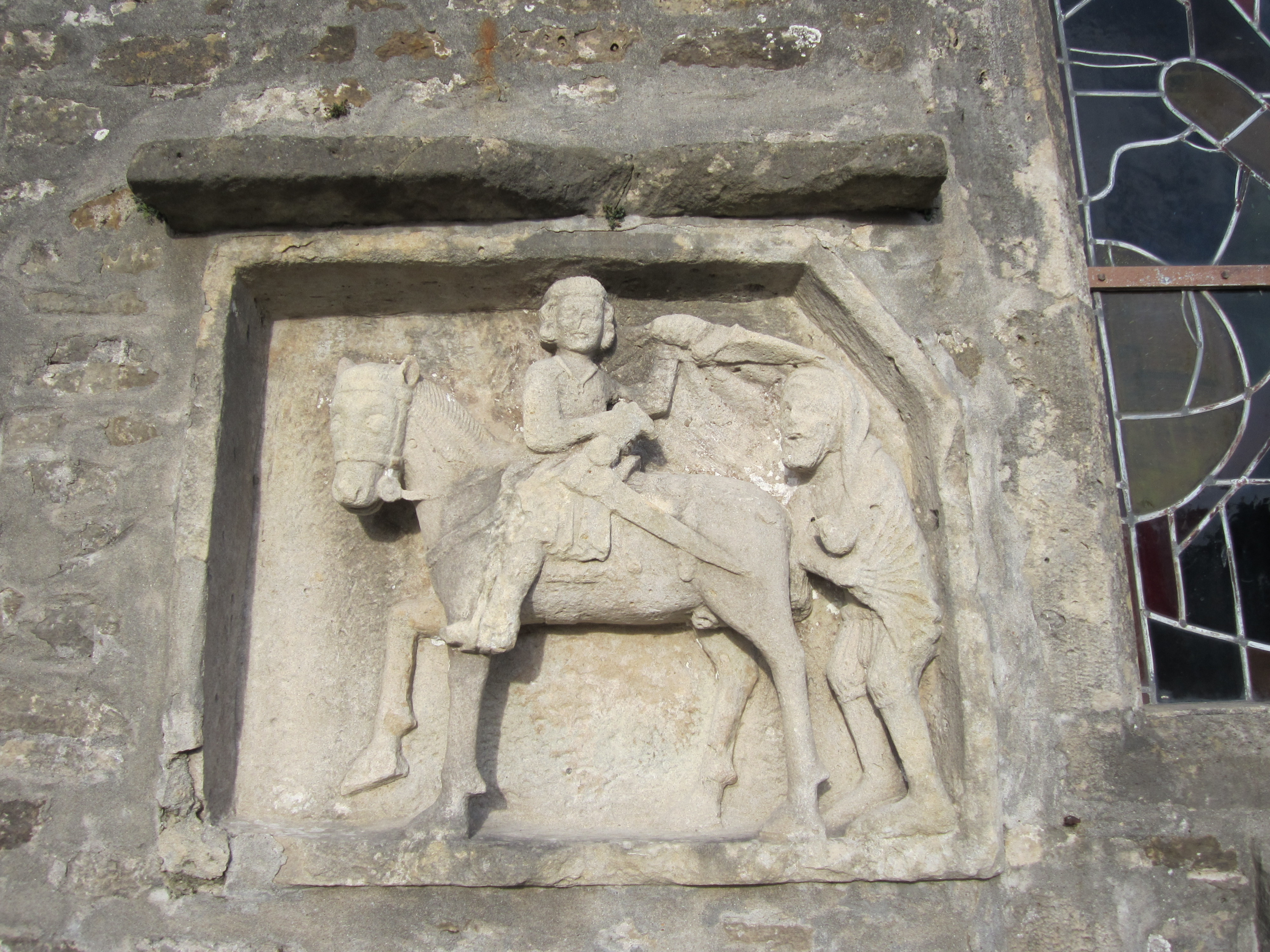 Ozeville, Manche